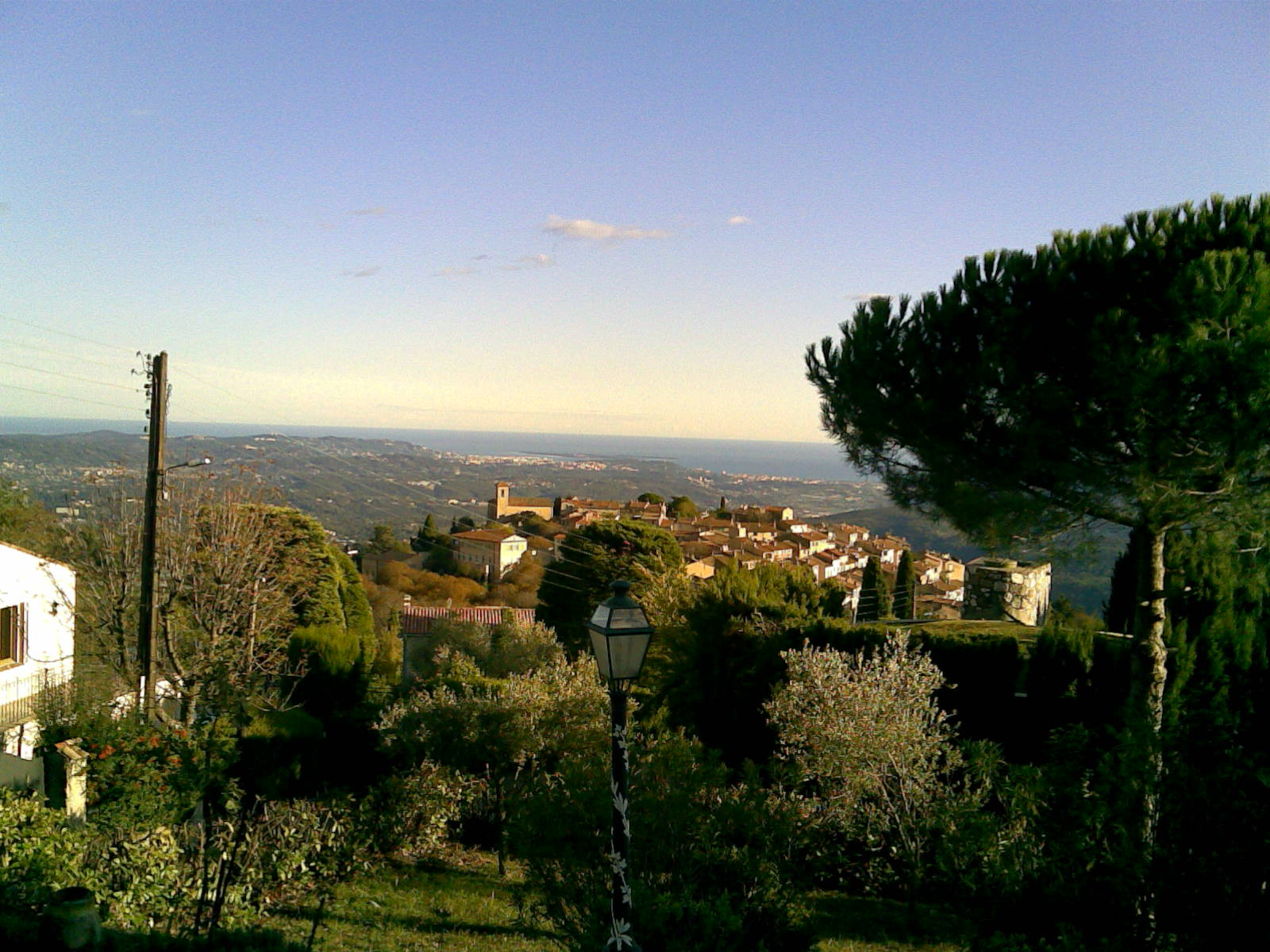 Vue du village de Cabris depuis la colline des Audides